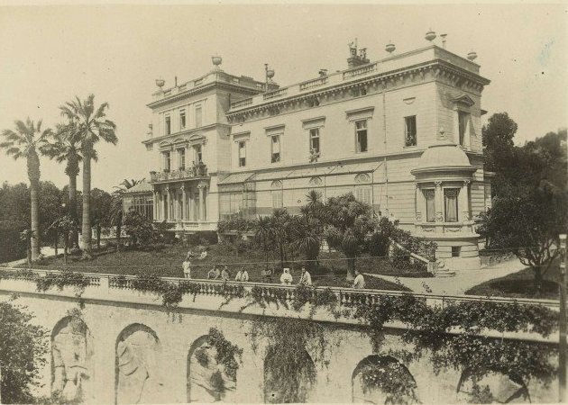 Fachada de la villa Wenden desde el este.